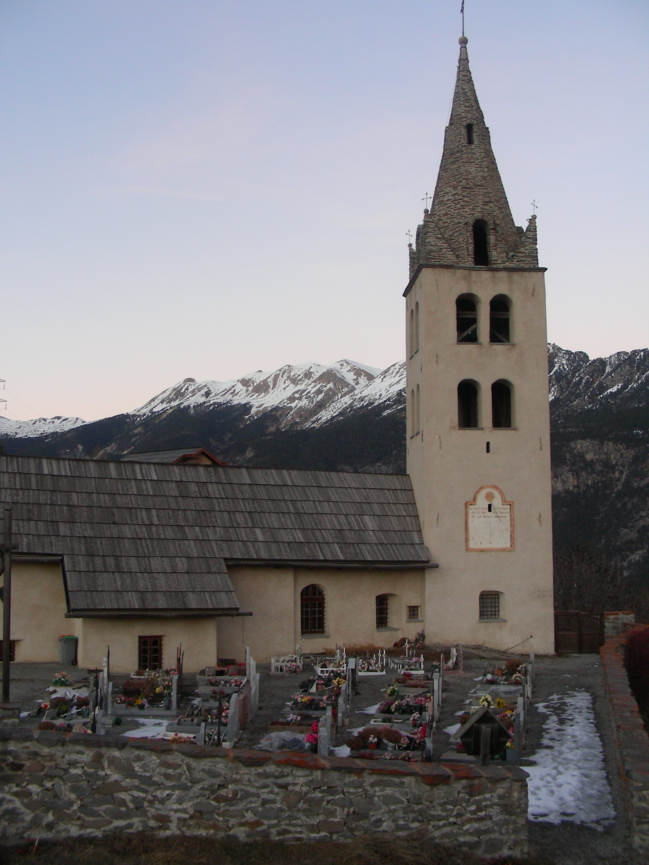 Église de Puy-Saint-Pierre.